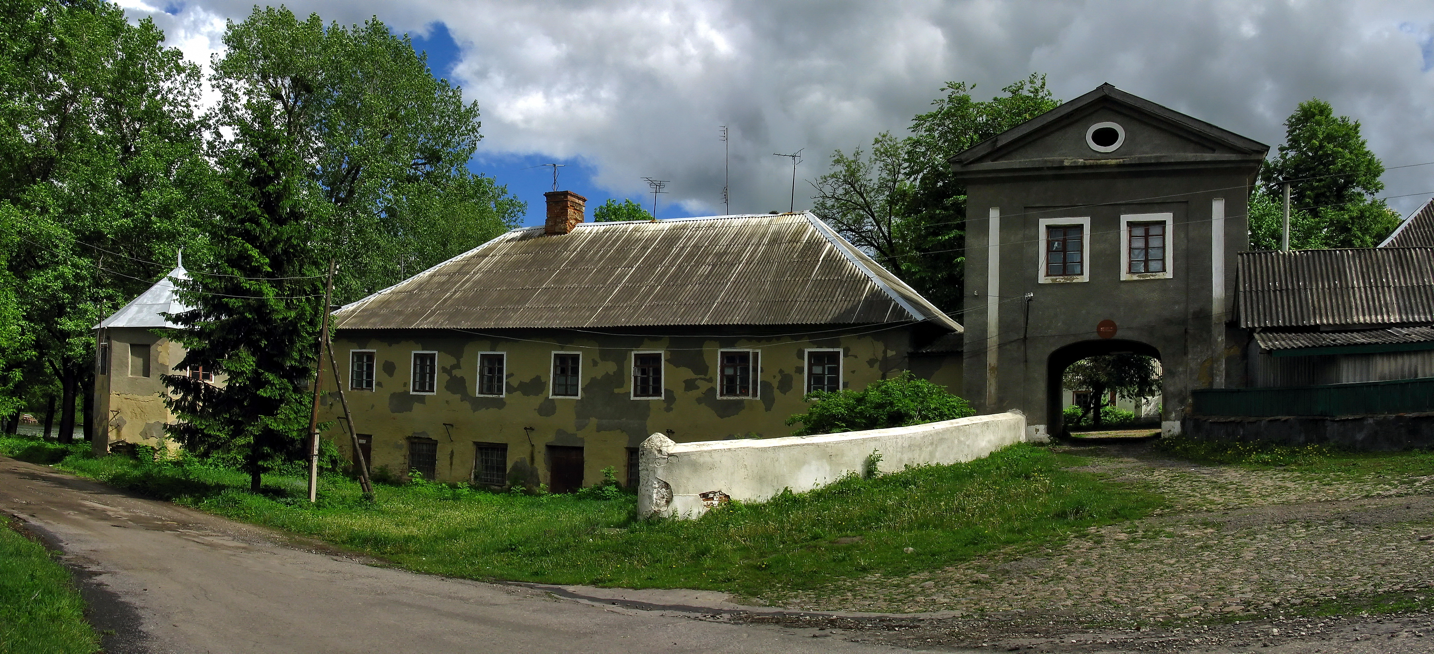 Замок-палац Швейковських, Тульчинський район, с. Шпиків вул. Леніна, 5